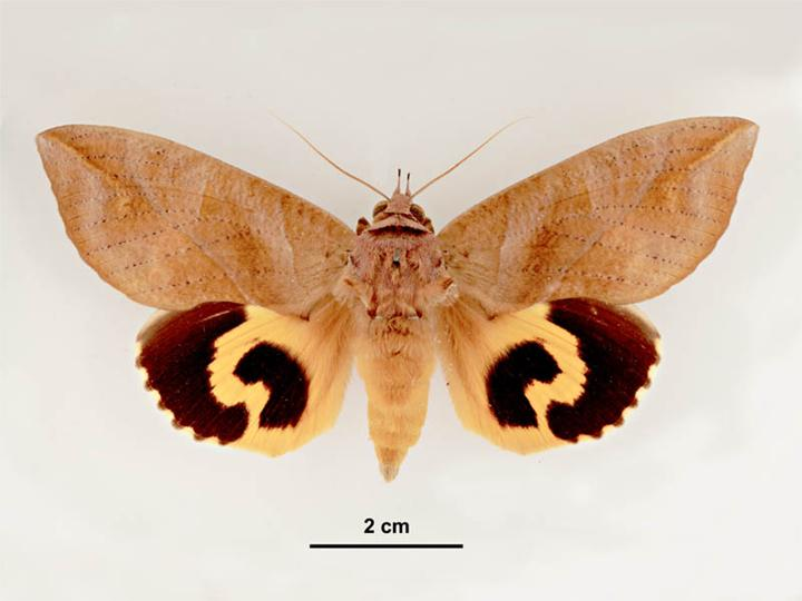 Eudocima phalonia male, dorsal view